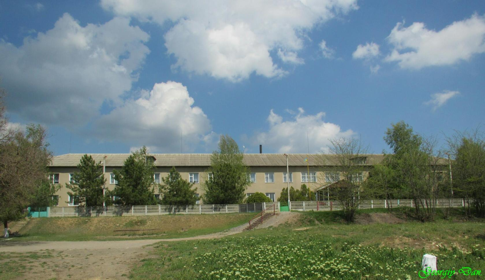 Новоукраїнська середня школа.